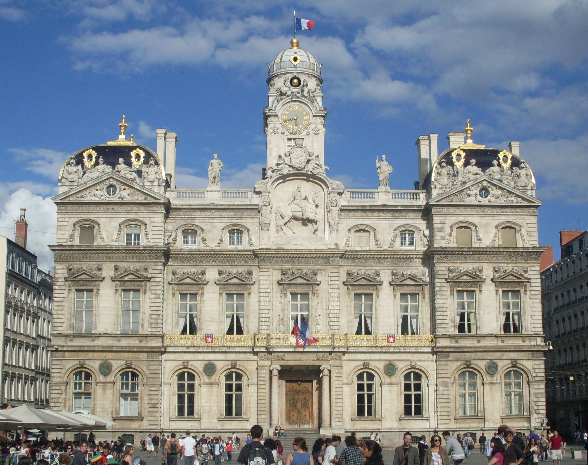 Façade de la mairie de Lyon août 2011